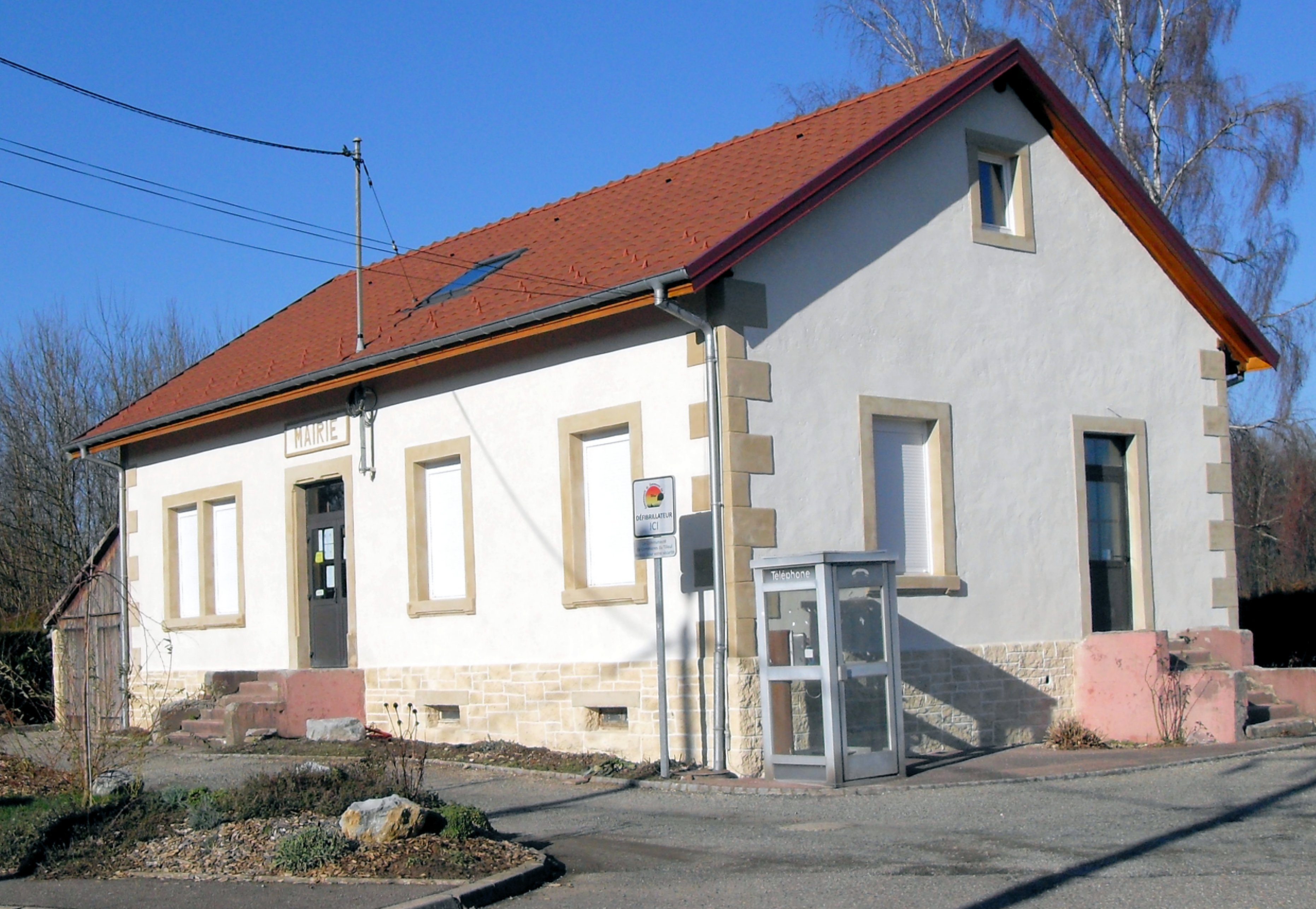 La mairie de Lagrange